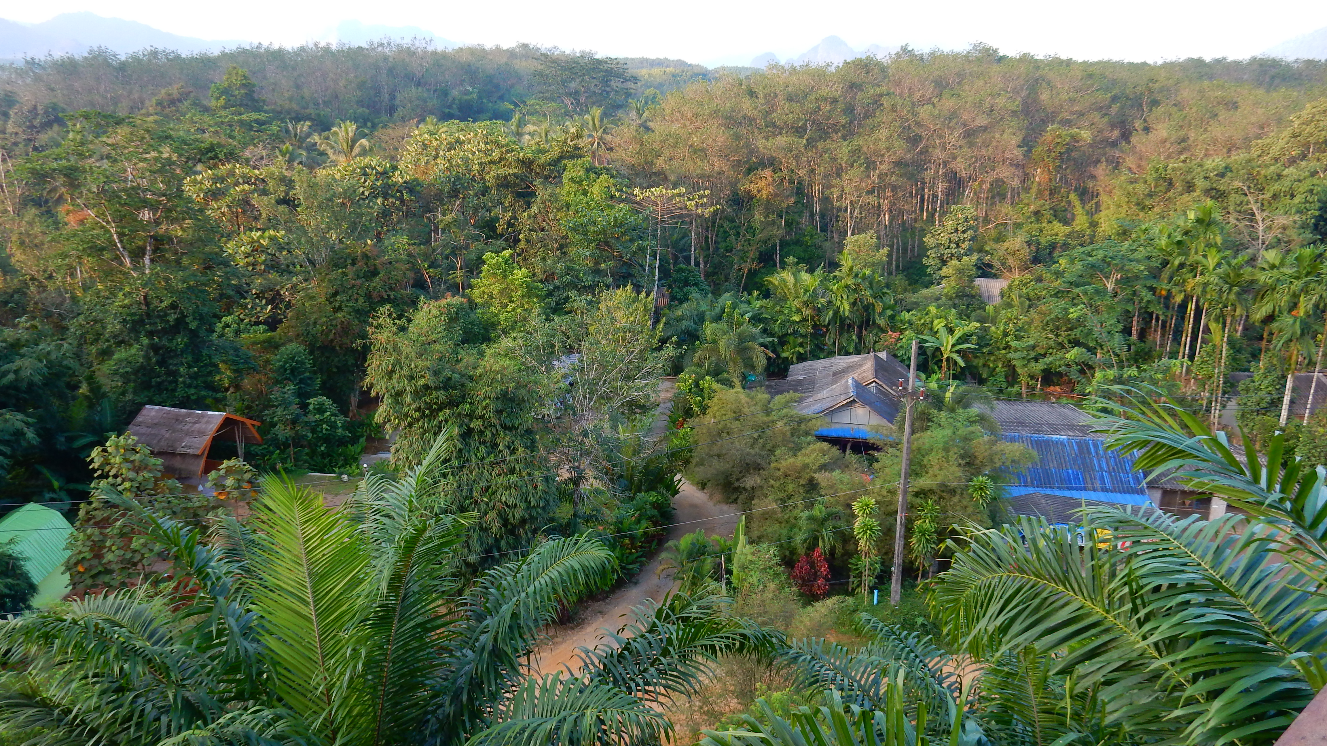 Khao Sok, 2014 December